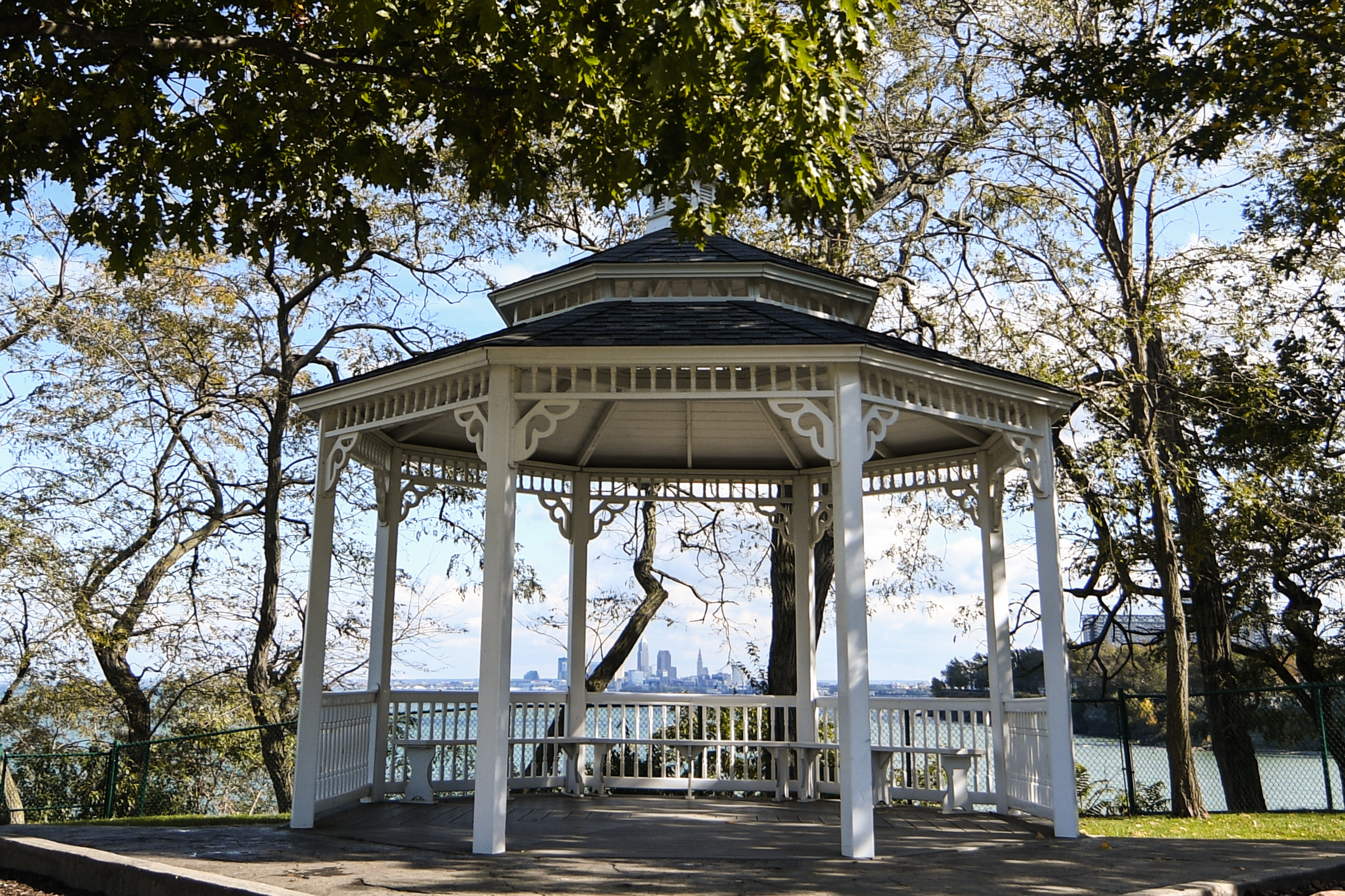 Lakewood Park